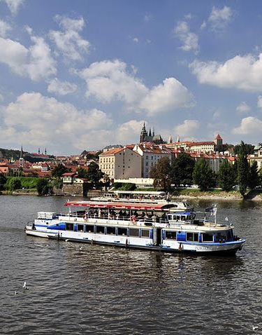 Česky: Loď Porto.